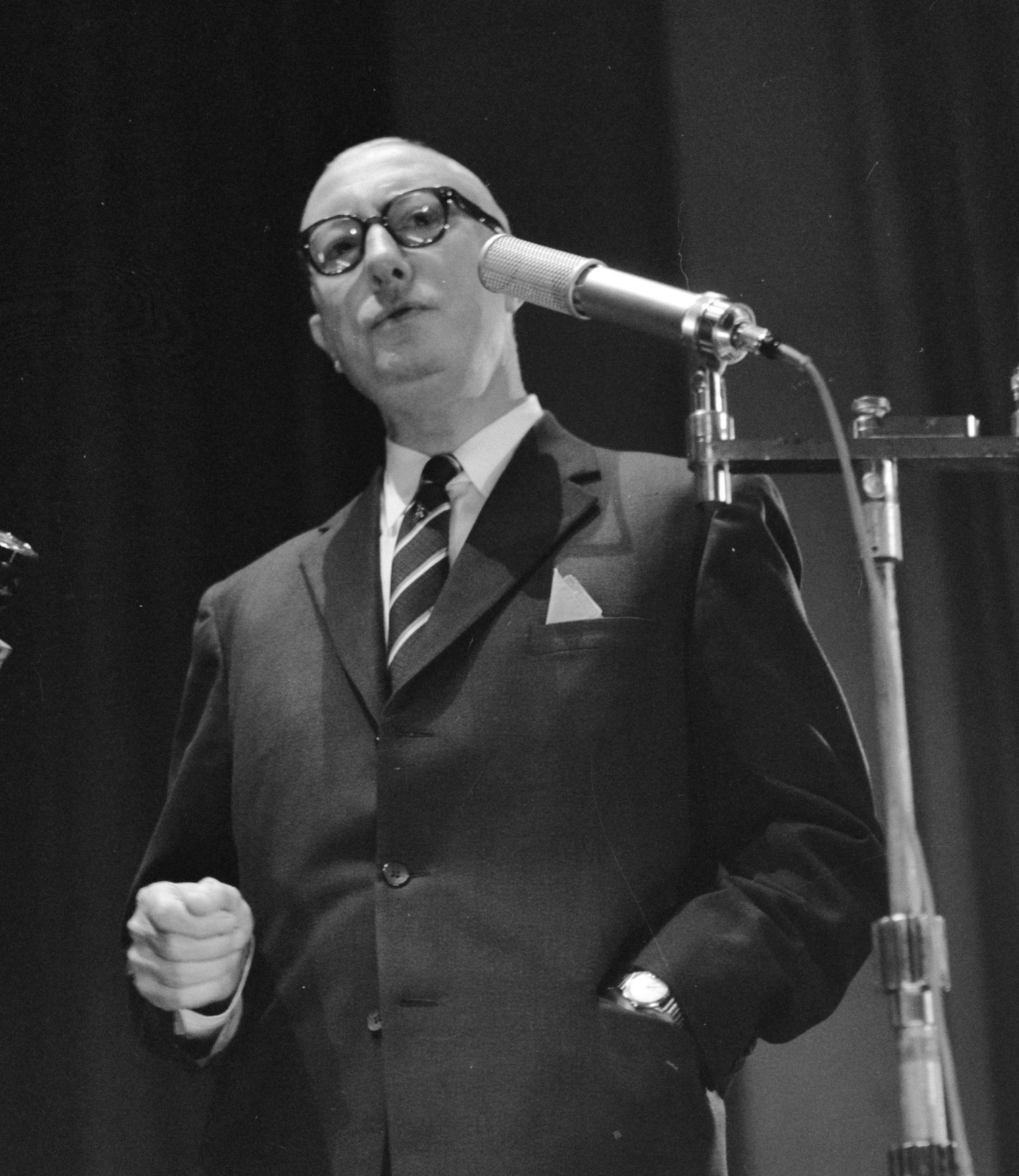 Collectie / Archief : Fotocollectie Anefo Reportage / Serie : [ onbekend ] Beschrijving : Dit is uw Leven in Singermuseum. Burgemeester van Wormerveer Lycklama en Cor Bruyn . Opdracht Zaanlander Datum : 5 november 1961 Persoonsnaam : Cor Bruyn Instellingsnaam : Singer Museum Fotograaf : Bilsen, Joop van / Anefo Auteursrechthebbende : Nationaal Archief Materiaalsoort : Negatief (zwart/wit) Nummer archiefinventaris : bekijk toegang 2.24.01.04 Bestanddeelnummer : 913-1456